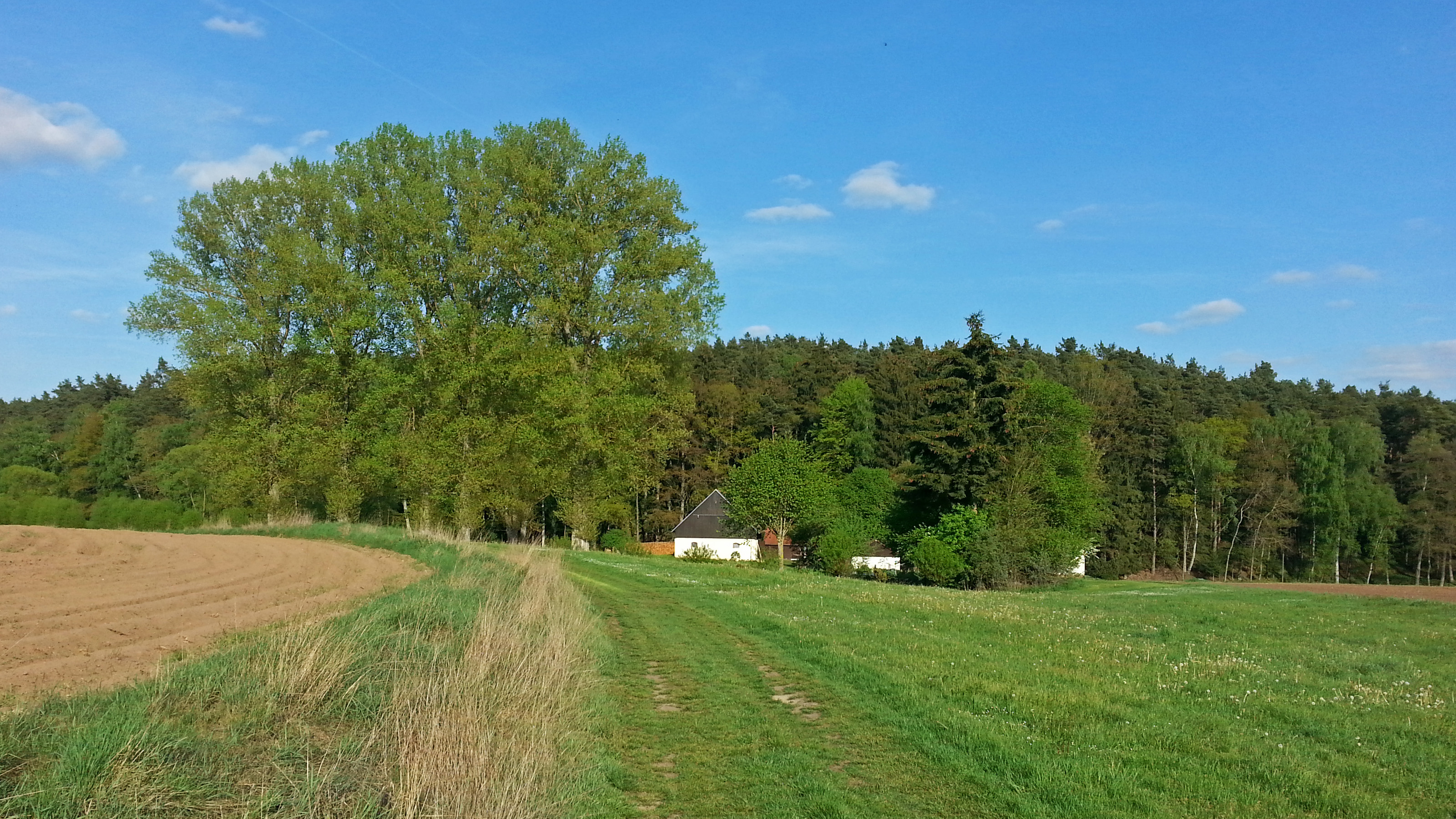 Die Schwalbenmühle